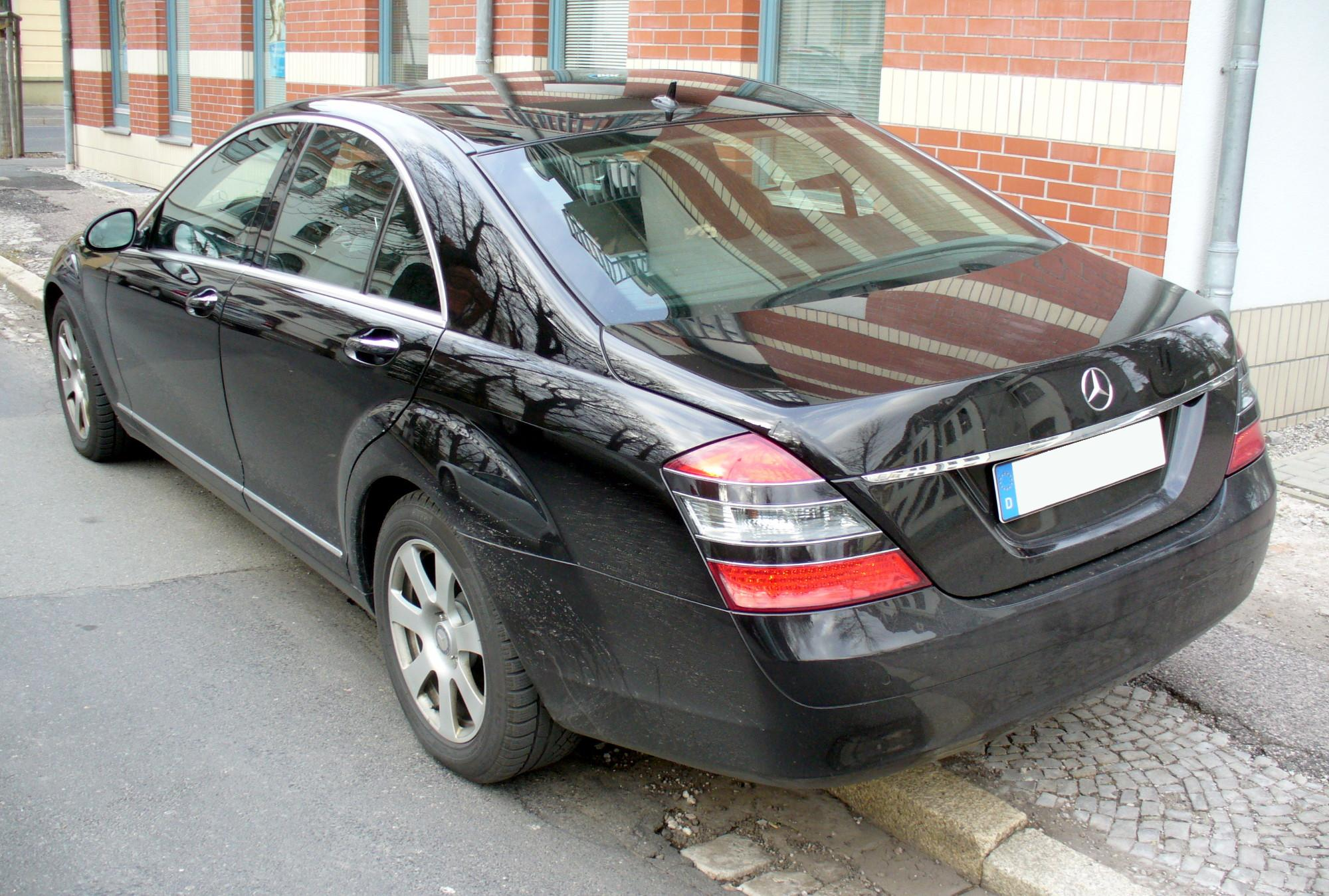 Mercedes-Benz W221